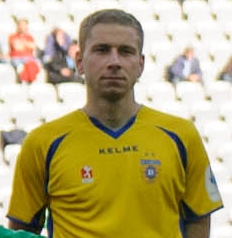 31 March 2012, Stozsice, Ljubljana, Slovenia - Olimpija during football game Olimpija - Domzale, round 27 of PrvaLiga 2011-2012.